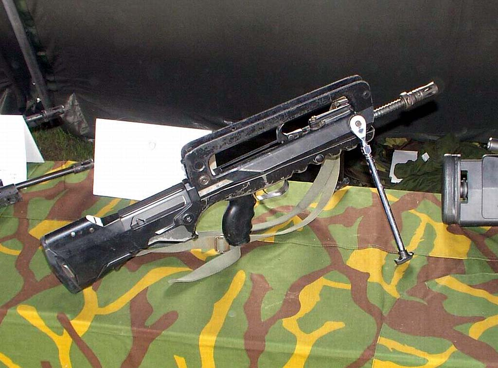 Аутоматска пушка ФАМАС, француске производње. Фотографију направио корисник Бонзо на Дан полиције.